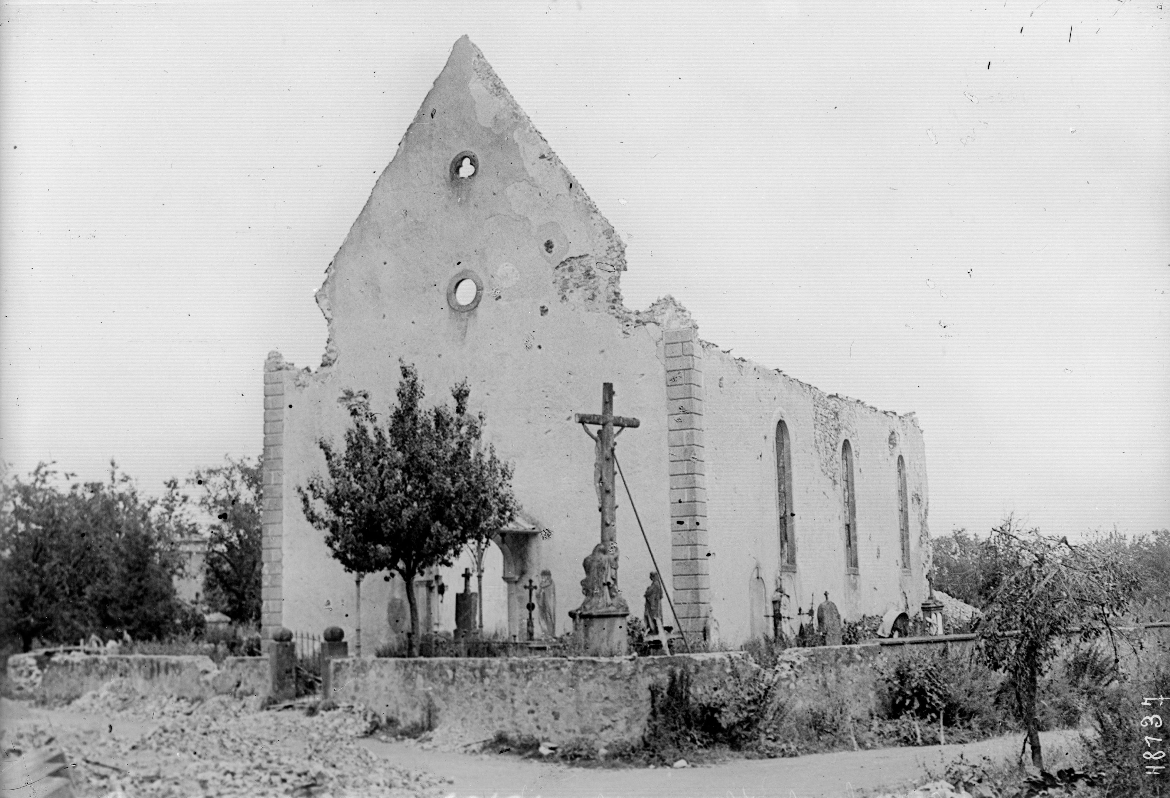 Eglise d'Aspach-le-Haut (Alsace), en ruine